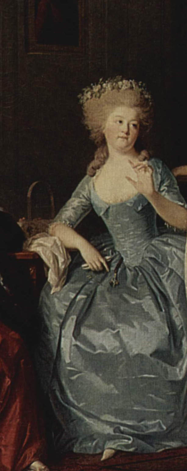 Прасковья Николаевня Гурьева, ур. Салтыкова(1764-1830)